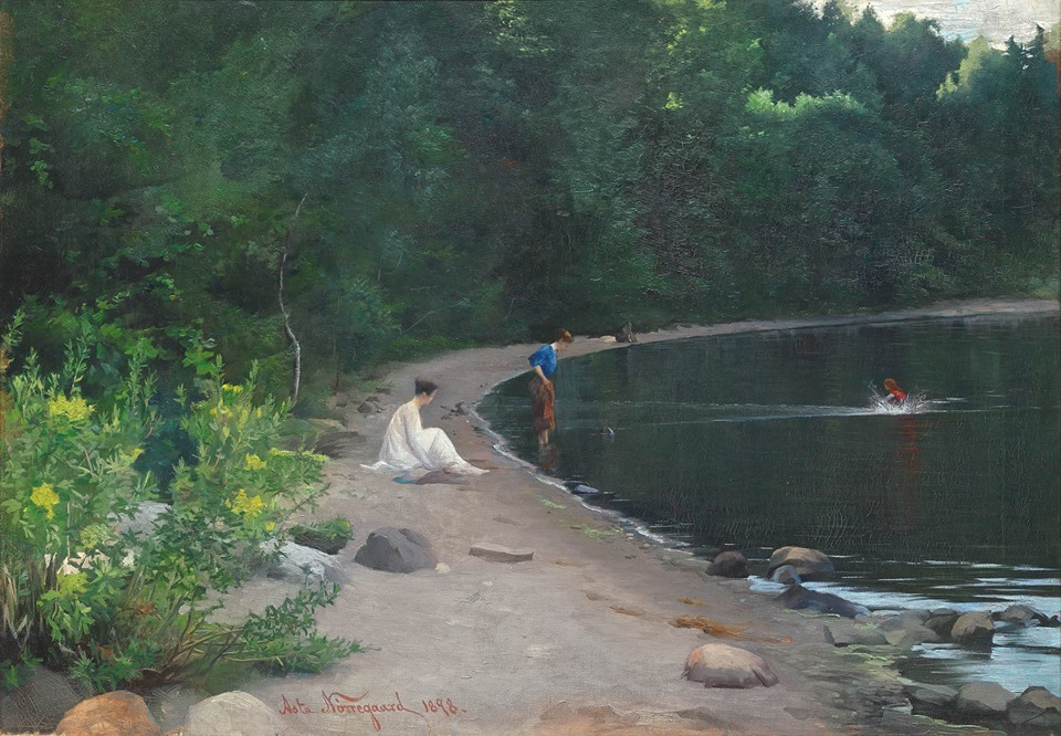 Картины художницы Asta Nørregaard (1853-1933). Женщины на пляже, 1898